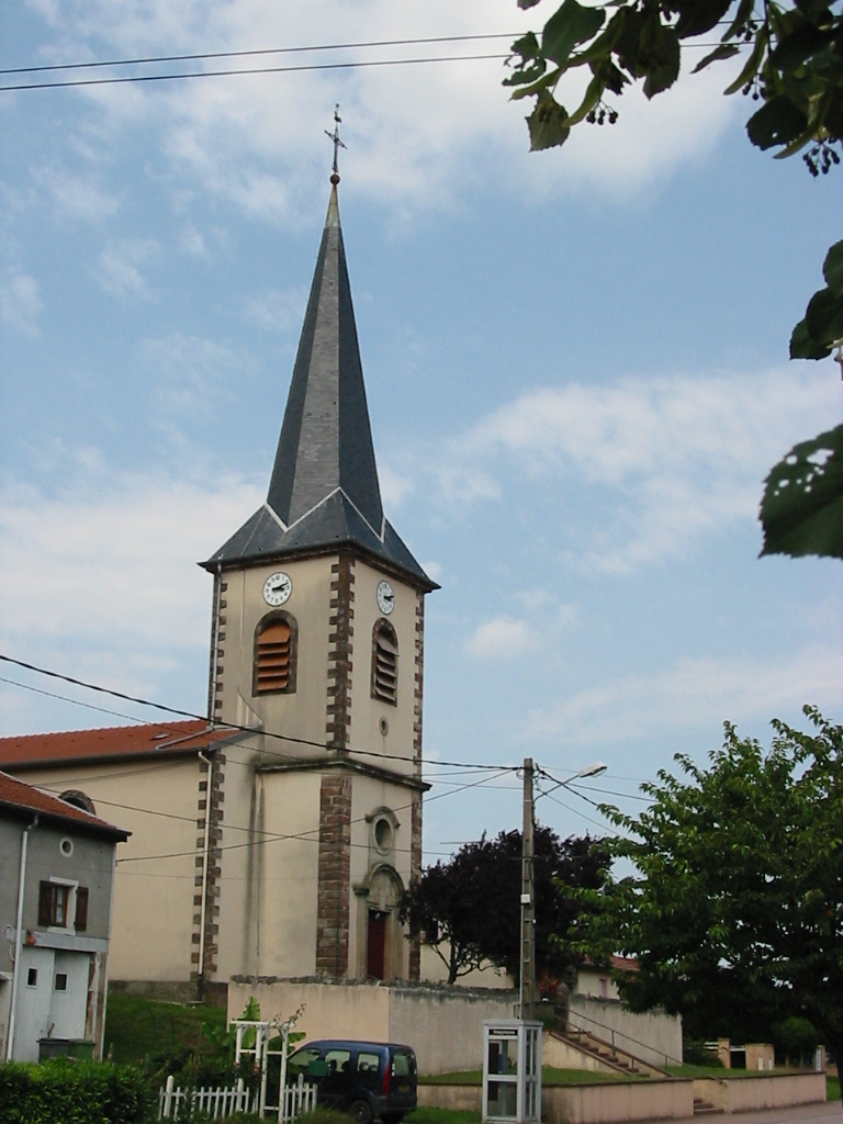 Église de Mattexey (Meurthe-et-Moselle)